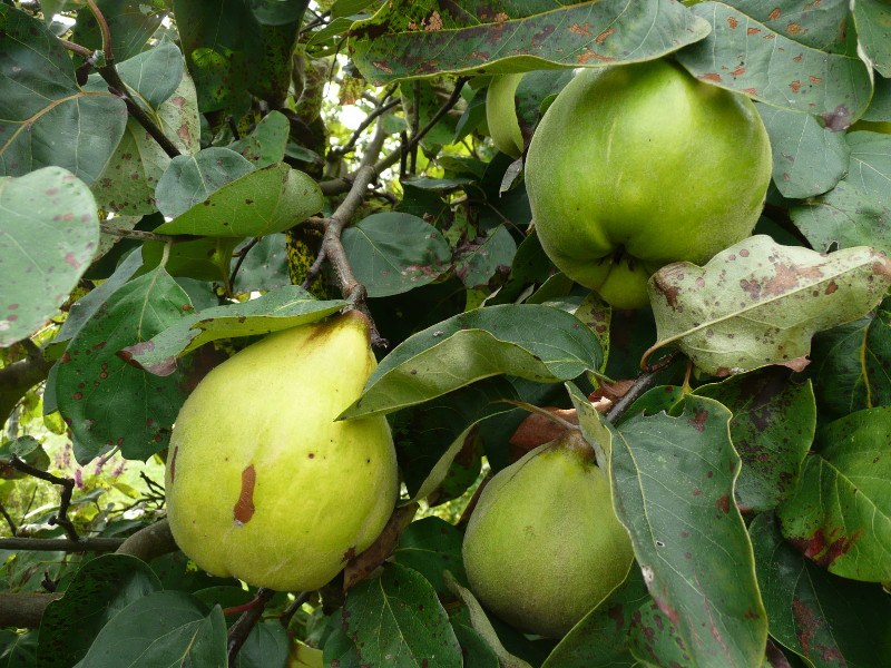 Cydonia oblonga cv. 'Portugiesische Birnenquitte'